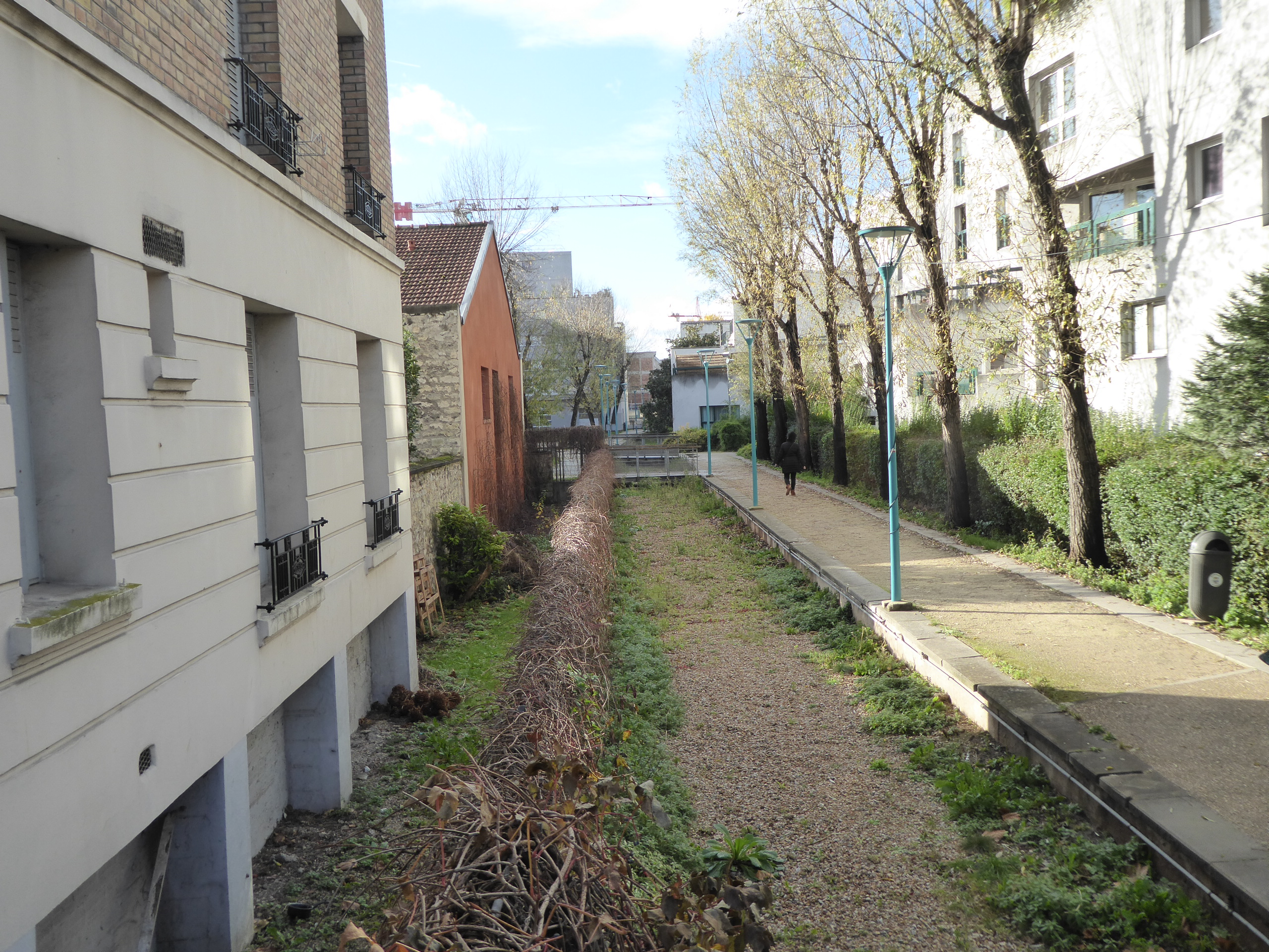 Bièvre recouverte Gentilly allée René Cassin 2